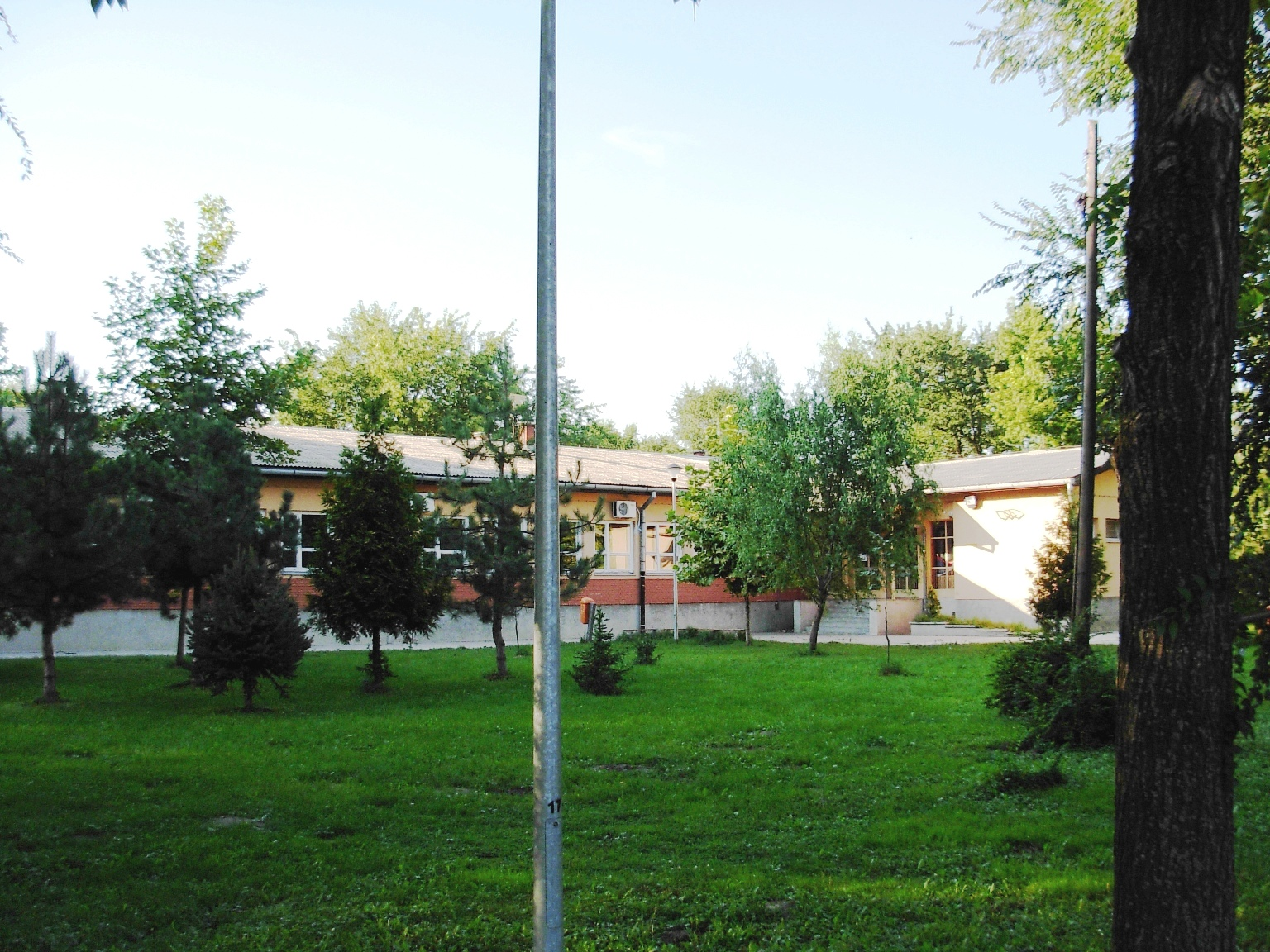 Osnovna škola "Veljko Vlahović" u Šangaju, Novi Sad.